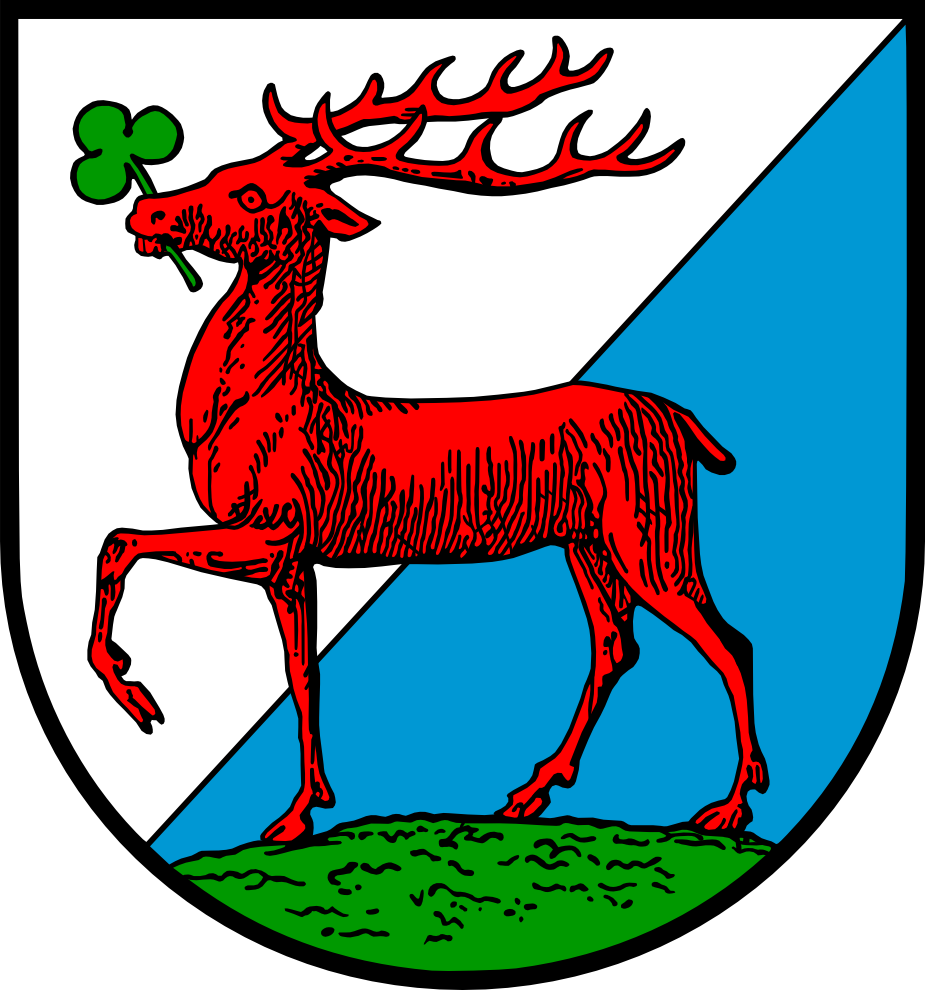 Das Wappen der Stadt Hirschberg i. Rsgb. Schläsch: Doas Woappa der Stoadt Herschbrich.